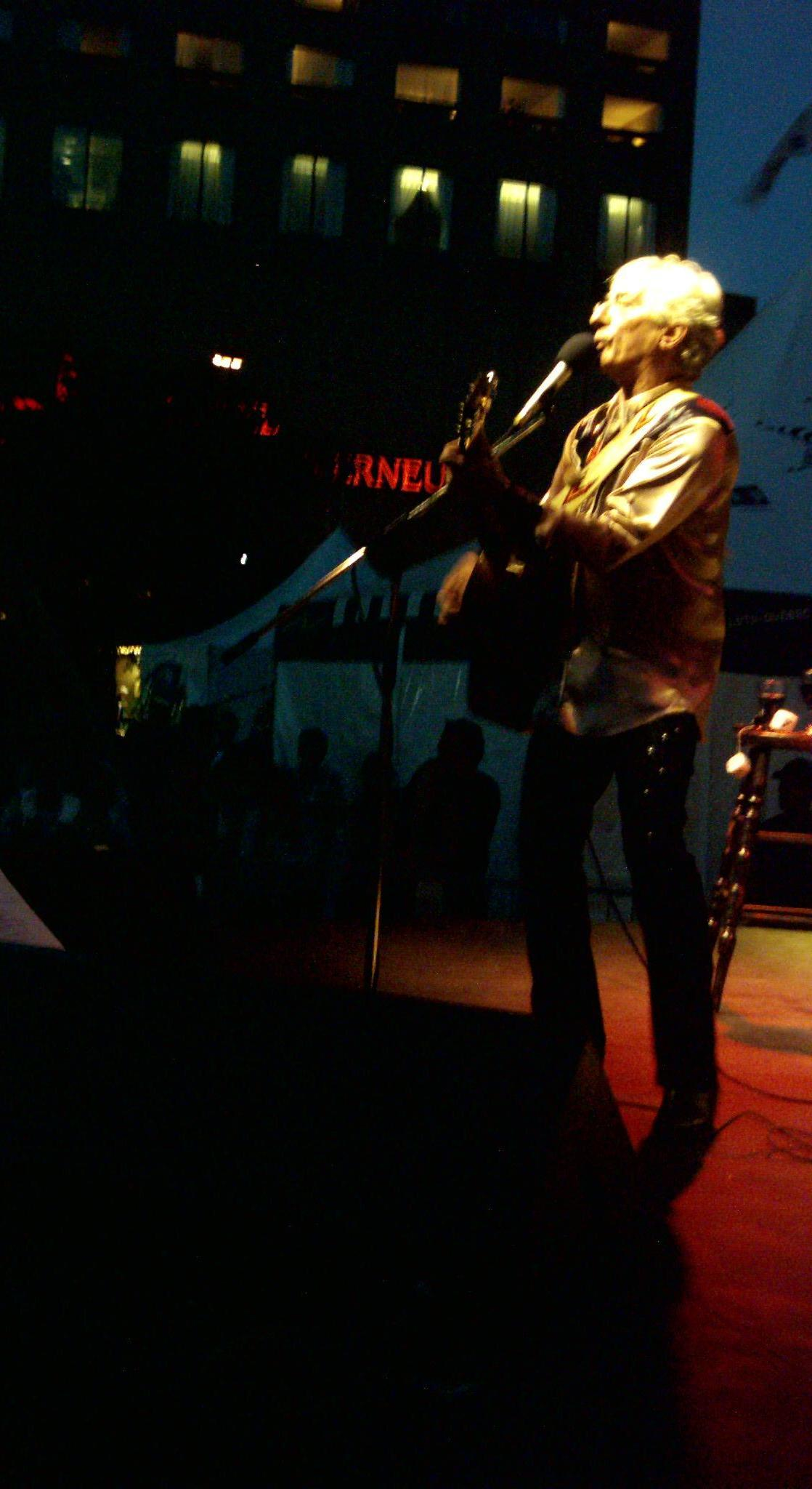 Richard Desjardins en spectacle à Montréal place Émilie Gamelin.